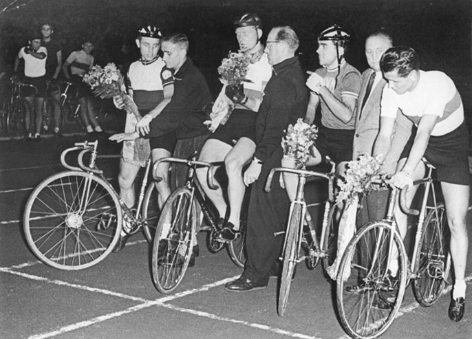 Manfred Günter Grünwald *15.8.1935 in Leipzig-Lindenau